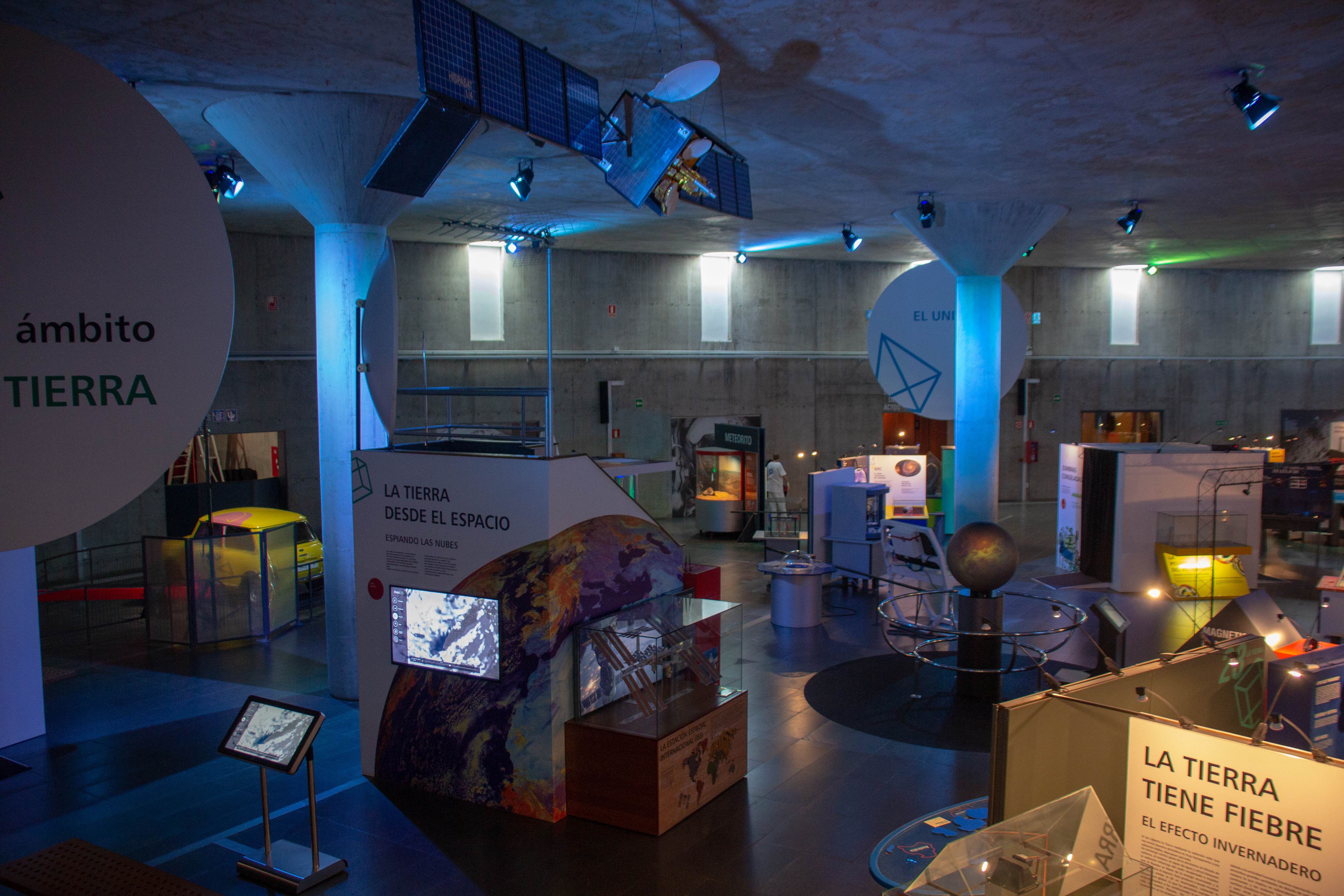 Museo de la Ciencia y el Cosmos, Tenerifel